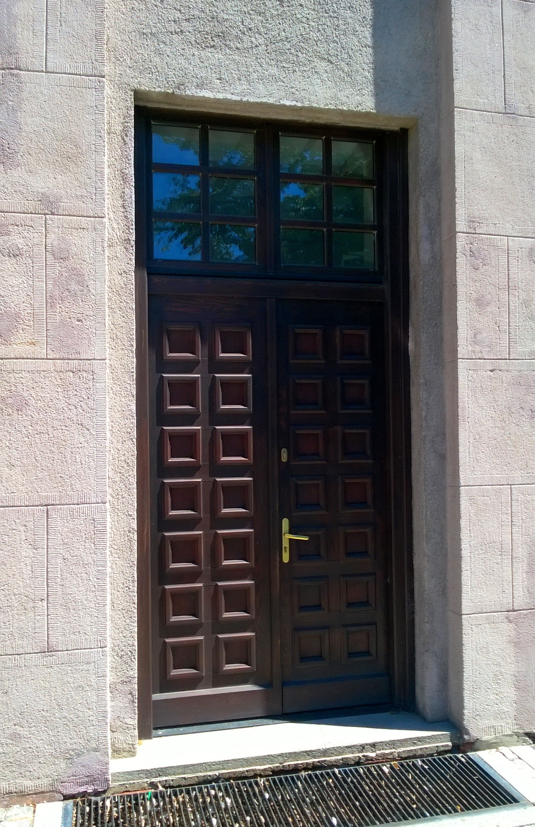 Budynek Archiwum Państwowego w Toruniu, wejście zachodnie